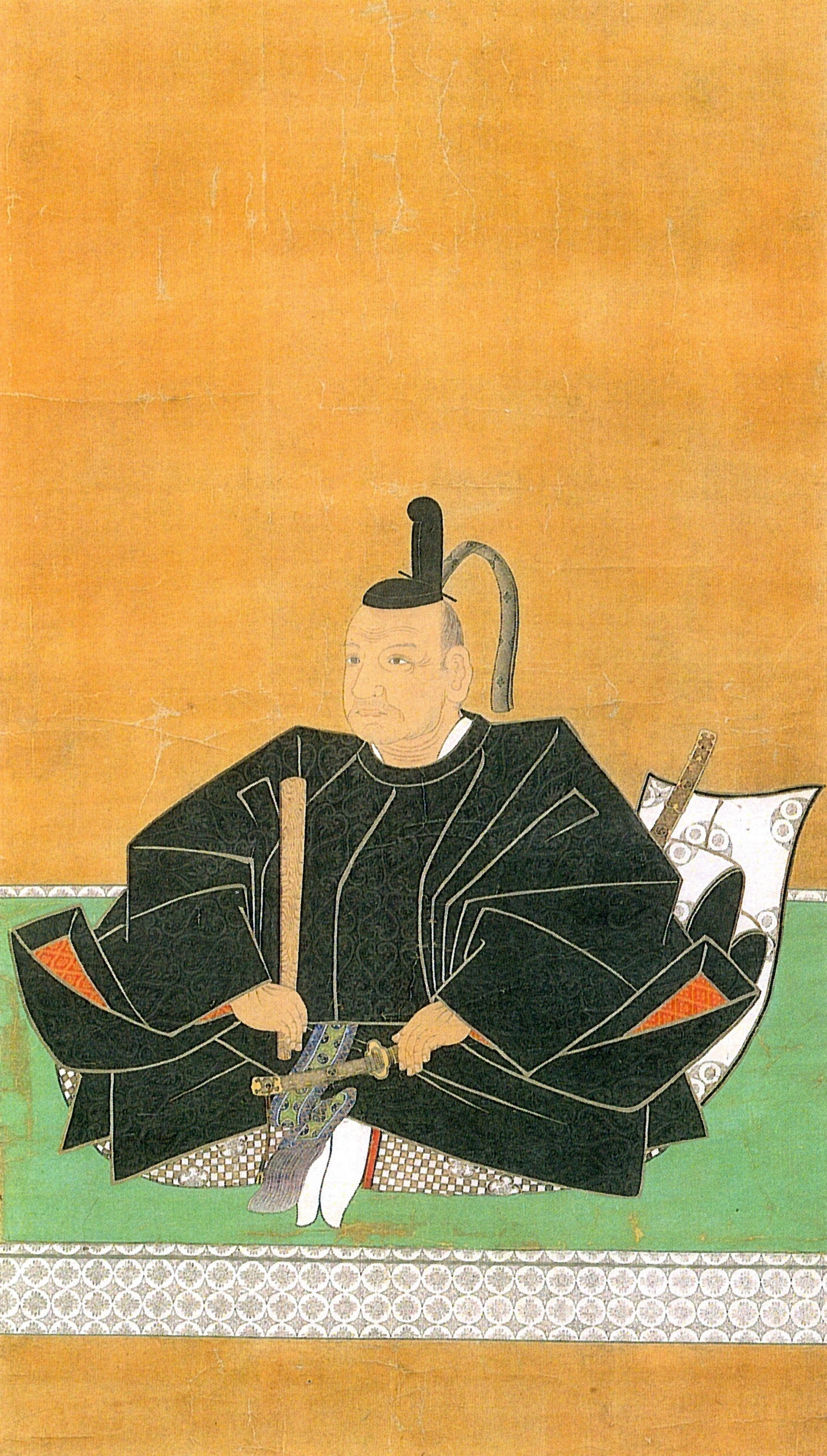 永井尚政の肖像。